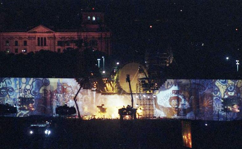 Berlin, Aufführung der Rockoper "The Wall" BER-405/ KB/22.7.90/Berlin: Rockspektakel "The Wall"/ Rund 300 000 Zuschauer aus ganz Europa und Übersee waren auf den ehemaligen "Todesstreifen" zwischen Brandenburger Tor und Leipziger Platz gekommen, um die Neuinszenierung der Rockoper "The Wall" von Ex-"Pink-Floyd" Chef Roger Waters zu erleben. Das gigantische Happening war zugleich Auftakt einer weltweiten Spendenaktion des World War Memorial Fund for Disaster Relief (Fond für Katastrophenofer). Die Show auf dem Potsdamer Platz in der Nacht vom 21. zum 22. Juli wurde vom Fernsehen live in alle Welt gestrahlt. Im Scheinwerferlicht auch ein Stück Graffitti-Malerei, Berliner Mauer typisch war. [Berlin, Potsdamer Platz.- Aufführung der Rockoper "The Wall" auf dem ehemaligen Todesstreifen]